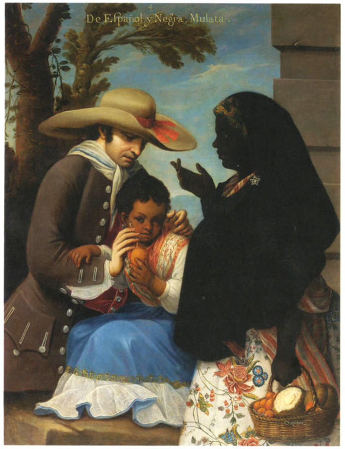 Pintura de Castas, 4. De español y negra – Mulata.